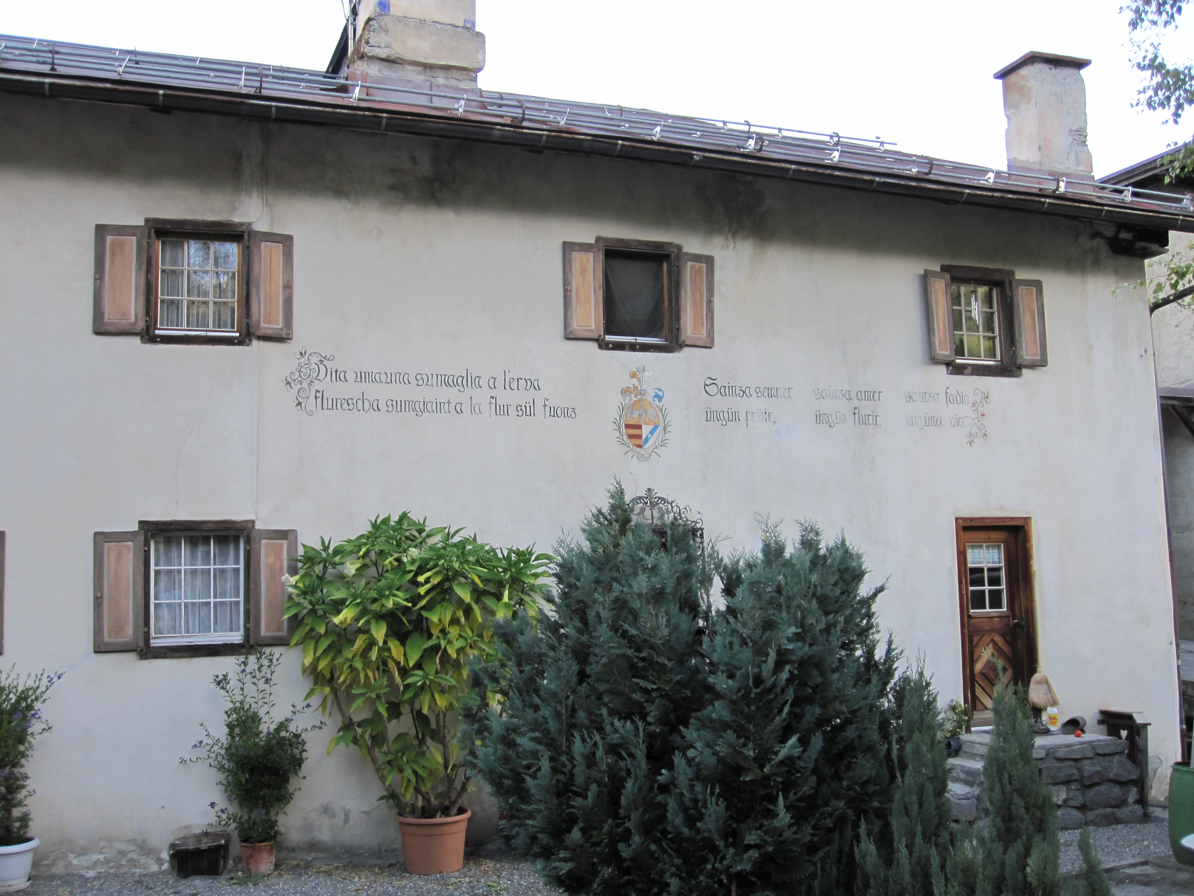 Inschrift auf Puter (Oberengadinische Sprache) in Bergün/Bravuogn